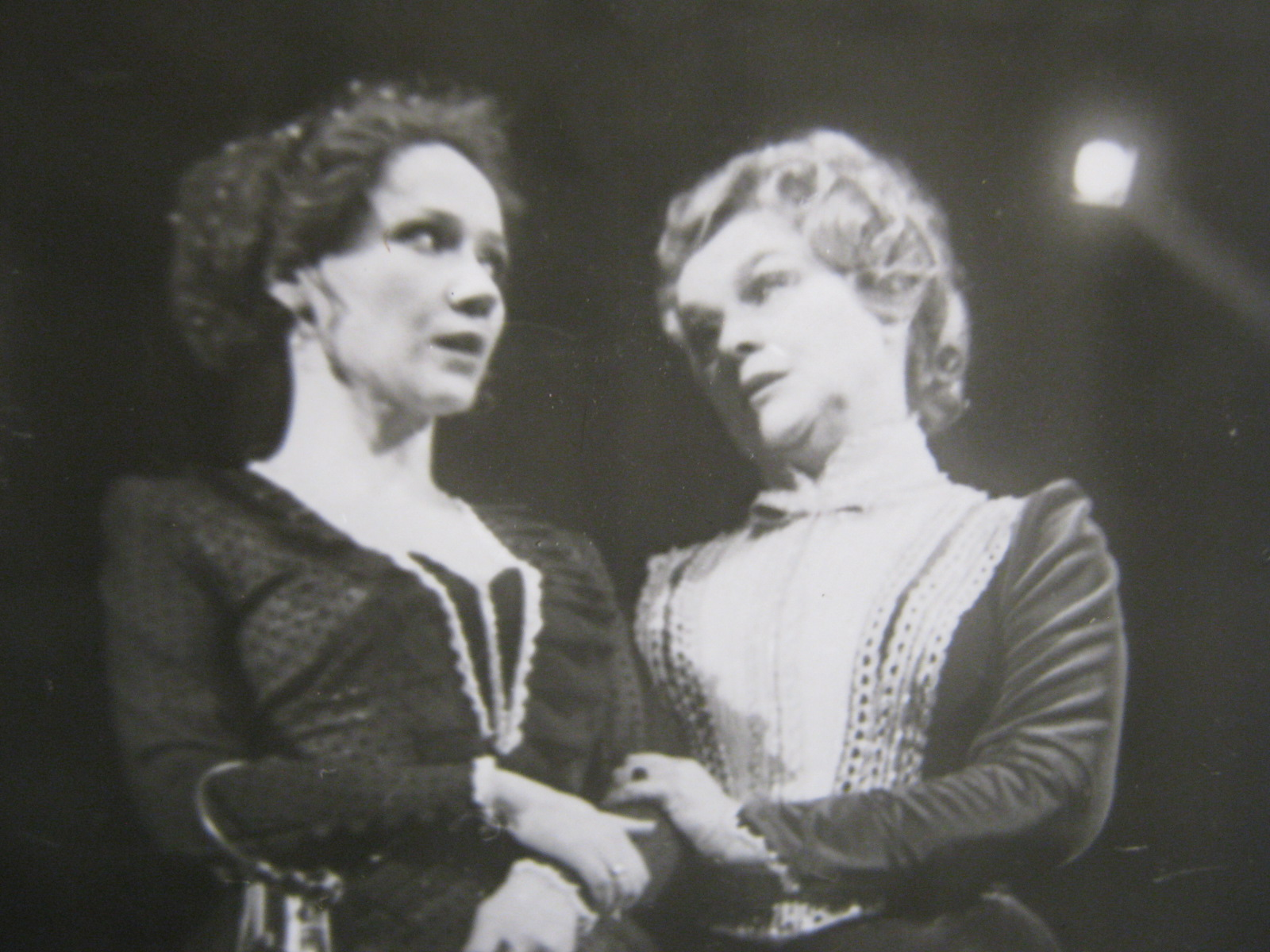 Сцена из спектакля «Женитьба Белугина» Н.Попова в роли Елены, Т.Пилецкая в роли Карминой Н.А., режиссёр-постановщик Егоров Геннадий Семёнович